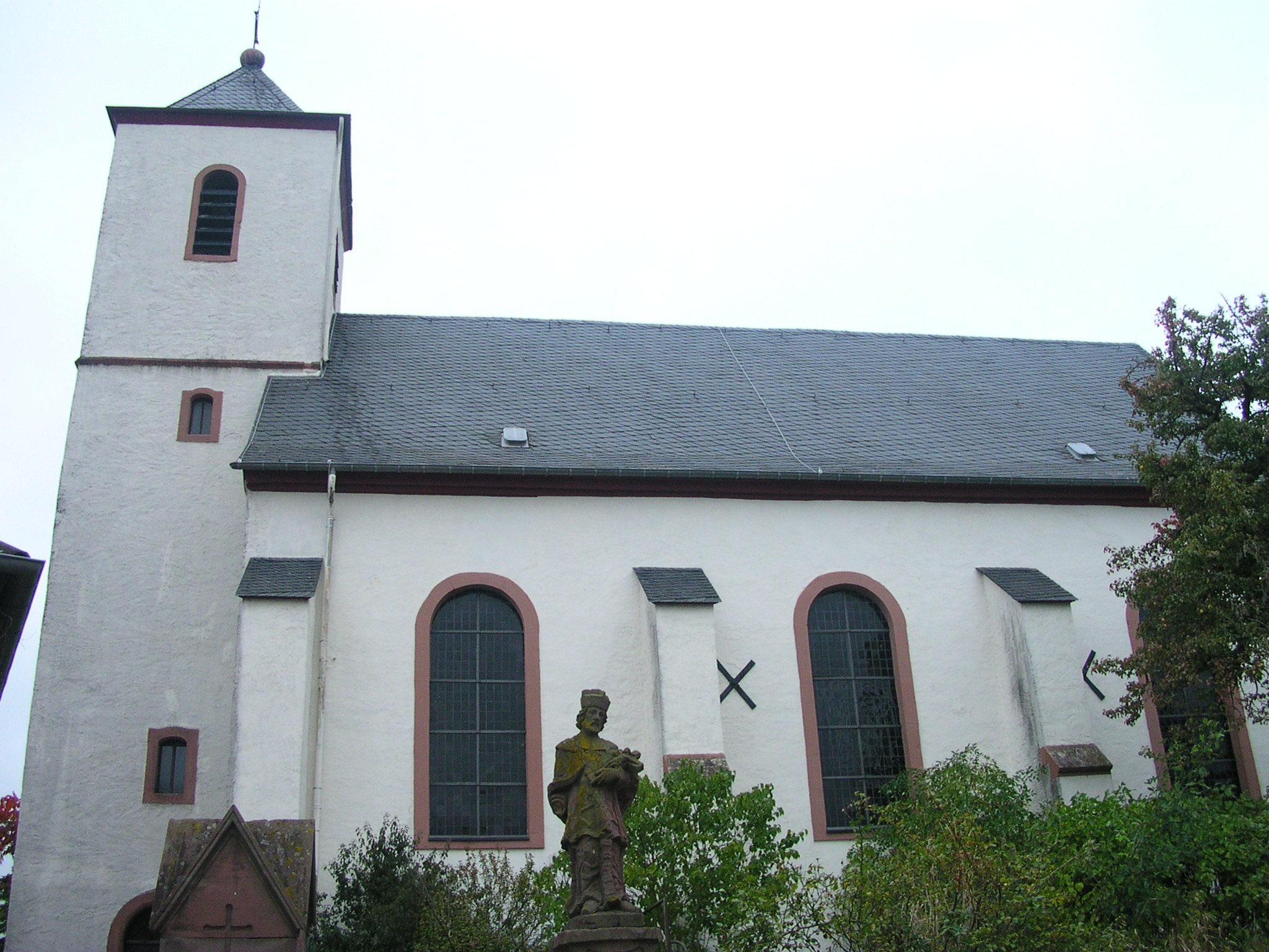 katholische Pfarrkirche St. Eucharius in Metterich